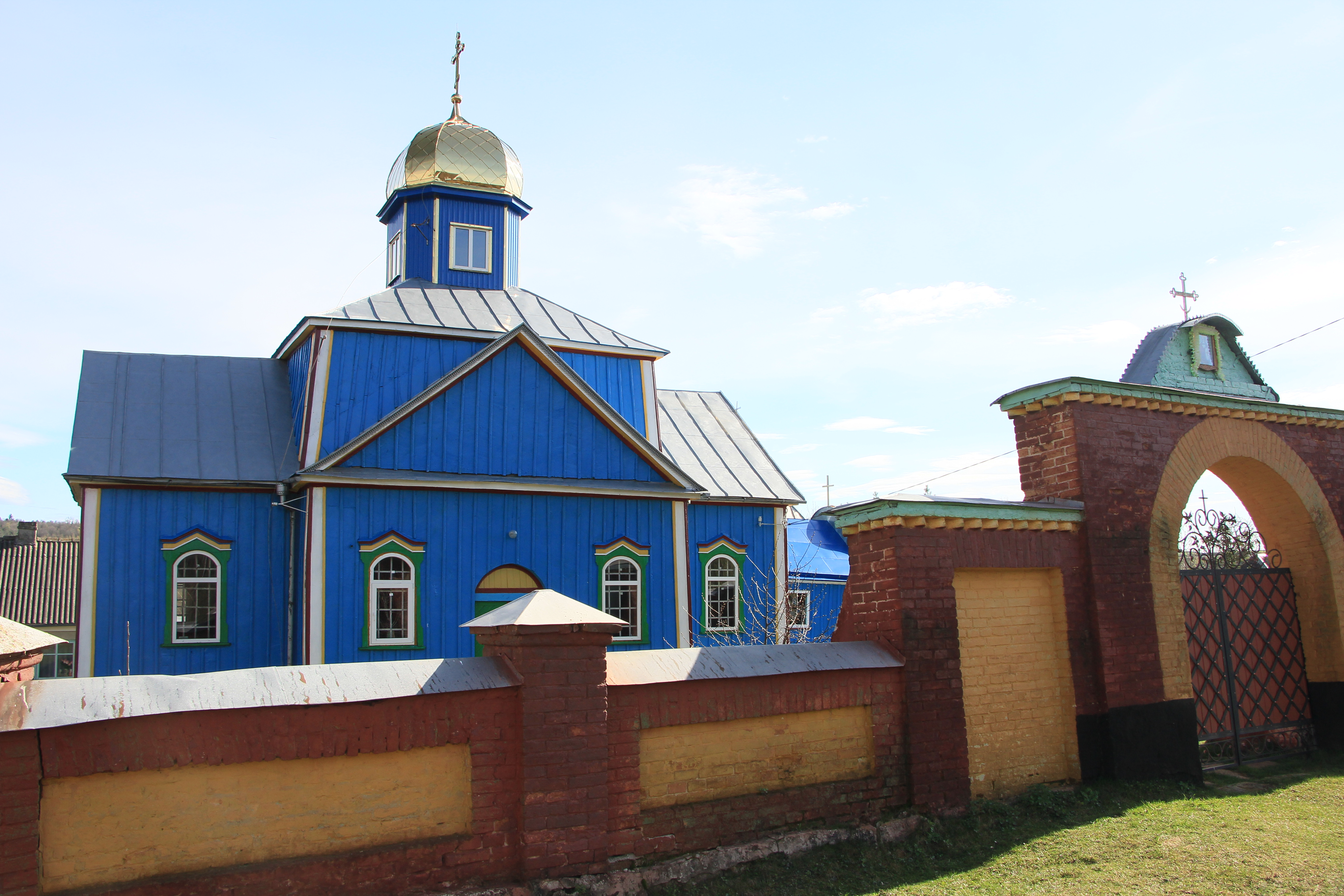 Дерев'яна церква в селі Устечко Кременецького району Тернопільської області